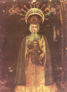 Imagen del retablo de la Virgen de Consolación de Táriba ubicado en la Basílica del mismo nombre. Su día se celebra el 15 de agosto. es la Patrona del estado Táchira.